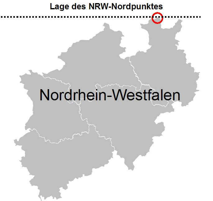 Lage des NRW-Nordpunktes in Rahden